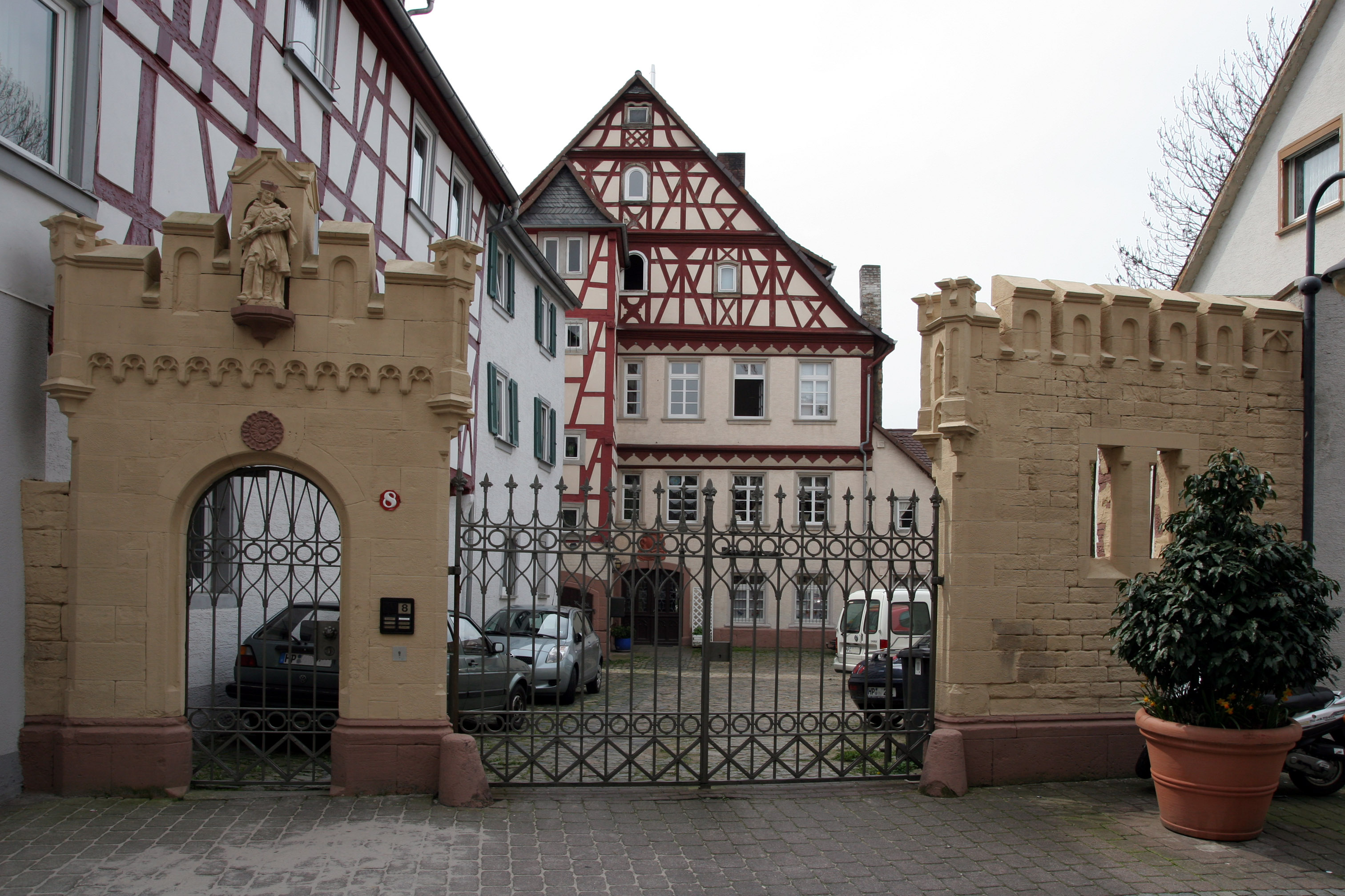 Der Hohenecker Hof in Bensheim. Ostseite